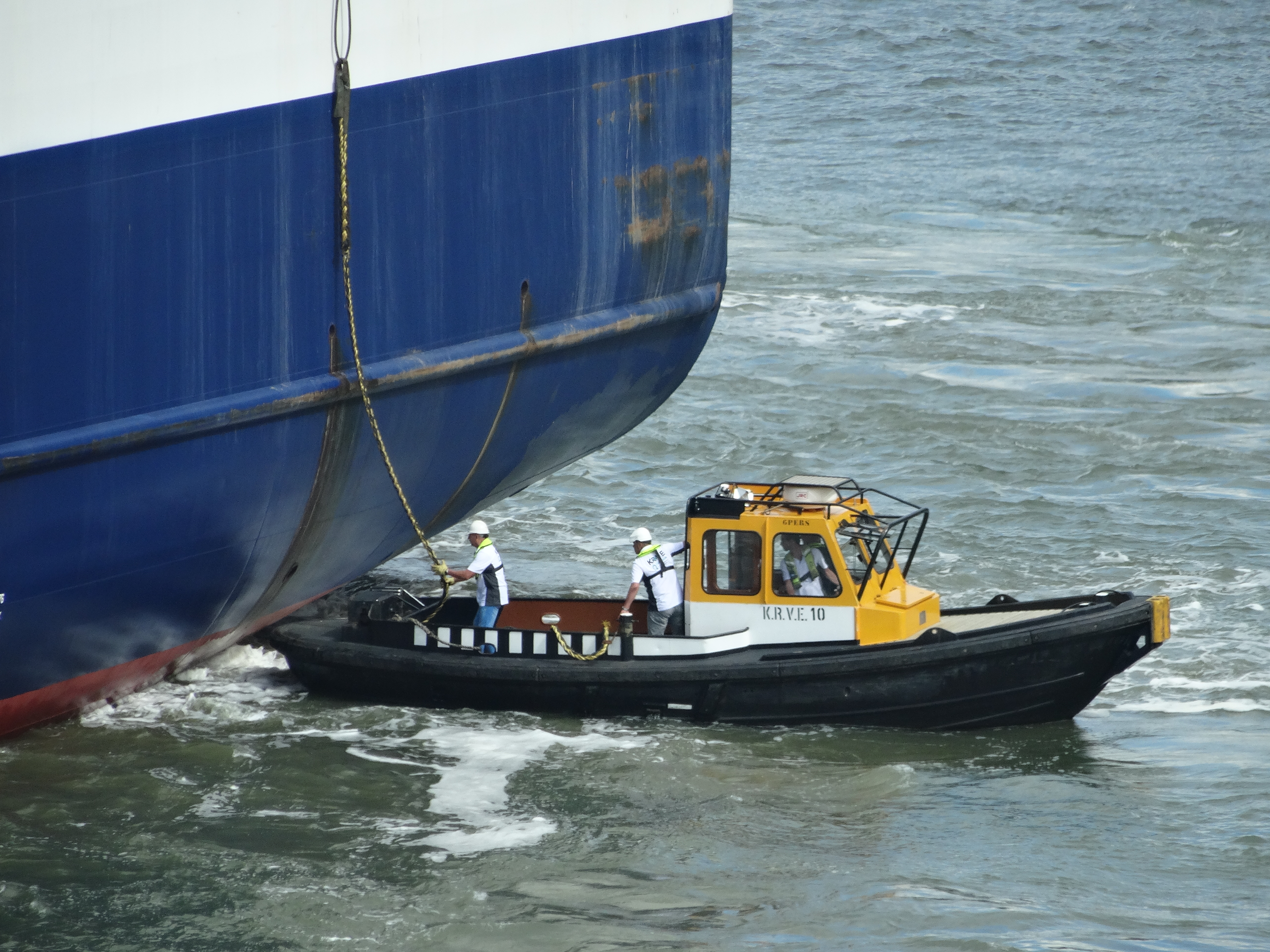 Demonstratie KRVE10 tijdens Wereldhavendagen 2017 i.s.m. Pride of Rotterdam.